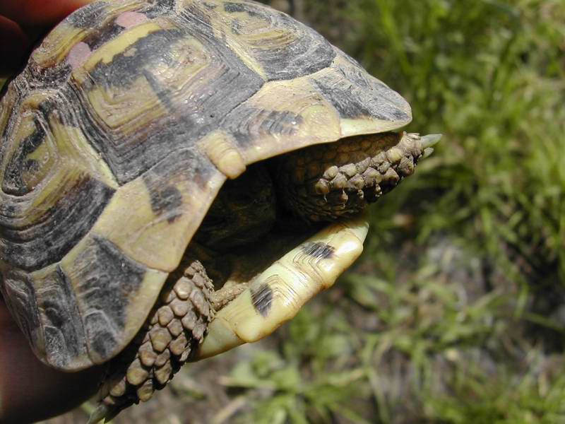 testudo hermanni hermanni fenotipo: Sarda